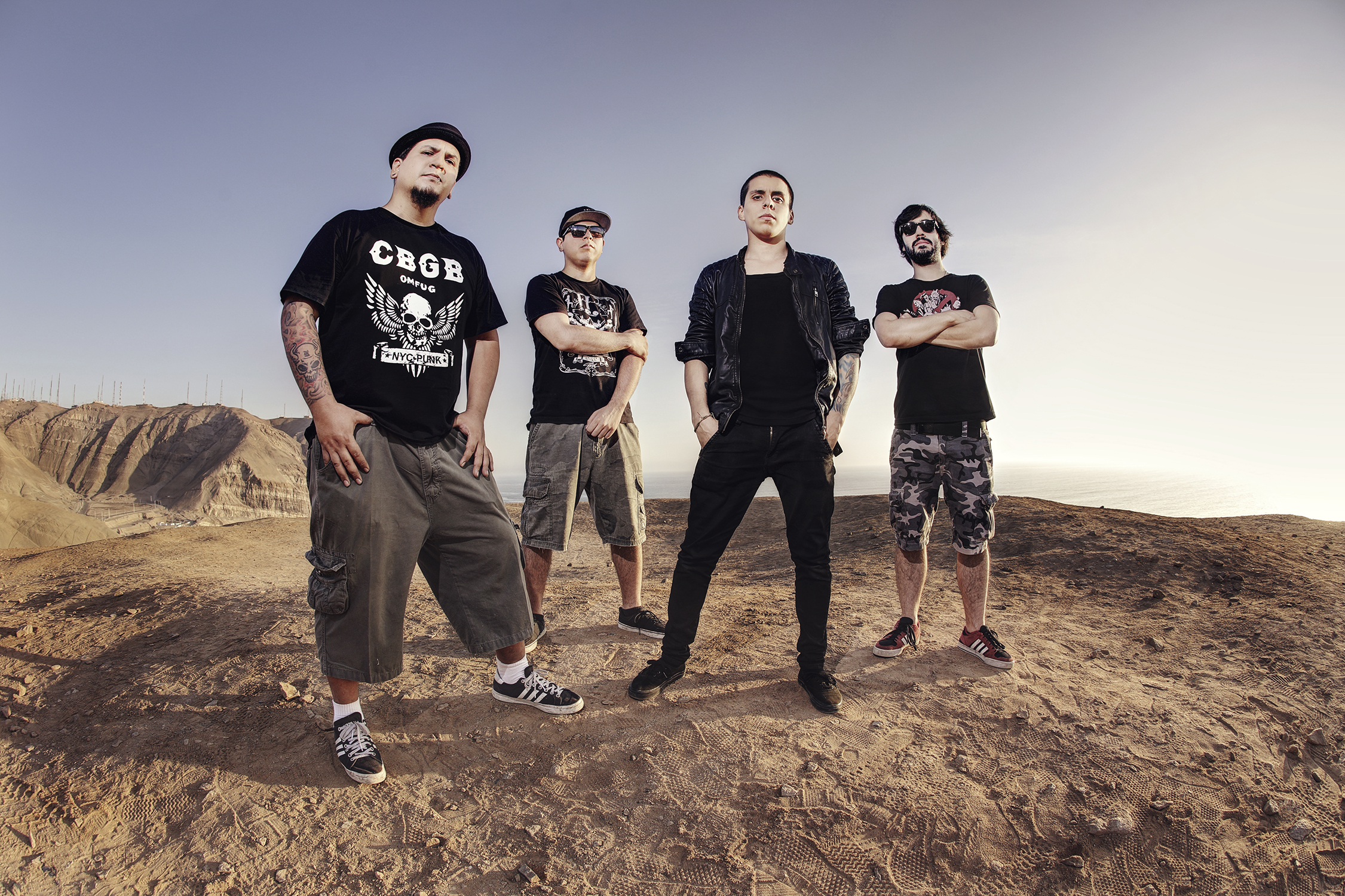 Recarga: Banda de Punk (2018)